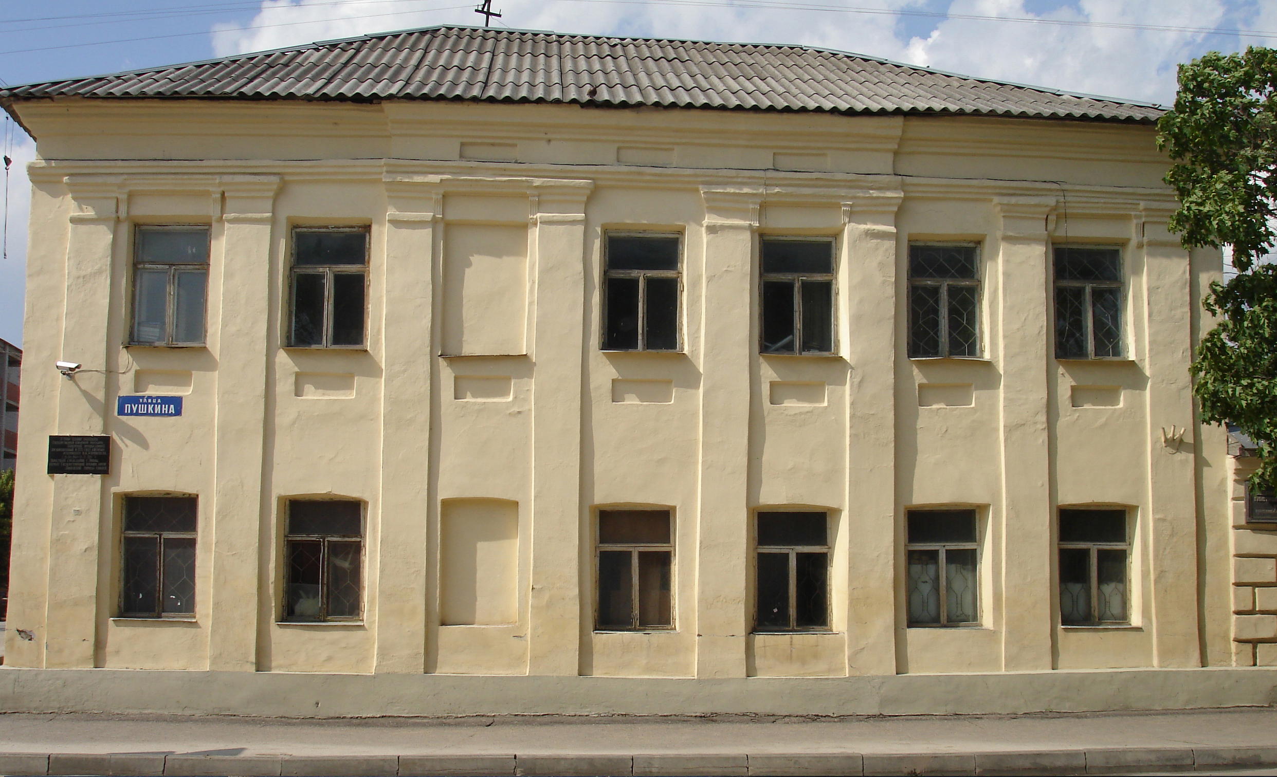 Госрассадник